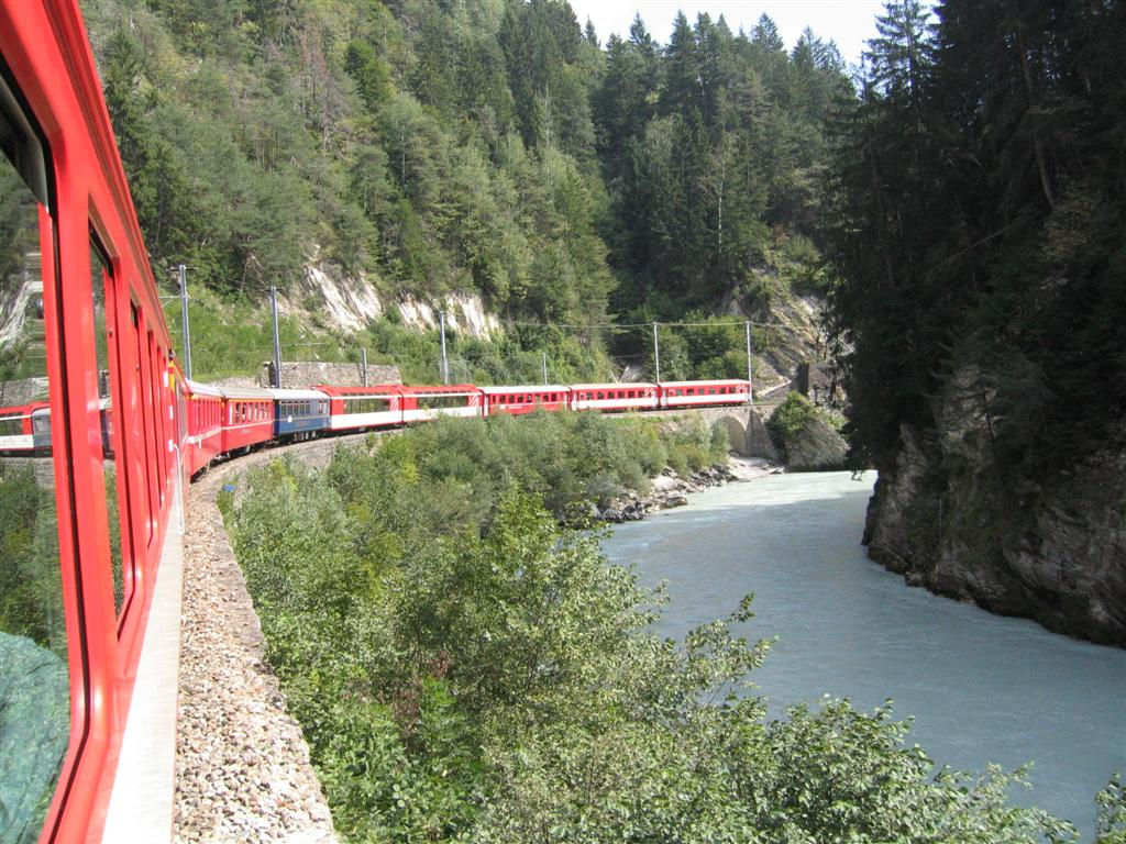 Glacier Express, Switzerland